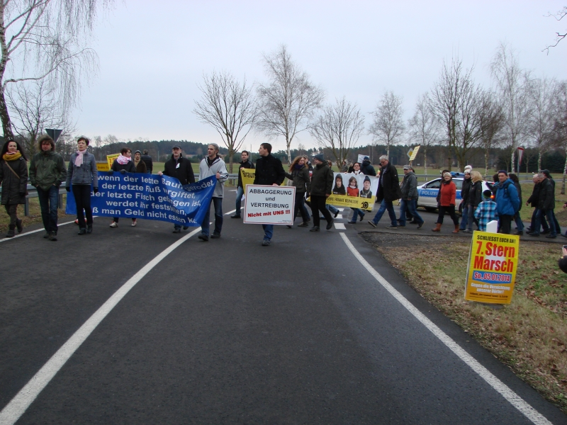 Sternmarsch gegen die Abbaggerung der Dörfer Atterwasch, Kerkwitz, Grabko durch Vattenfall